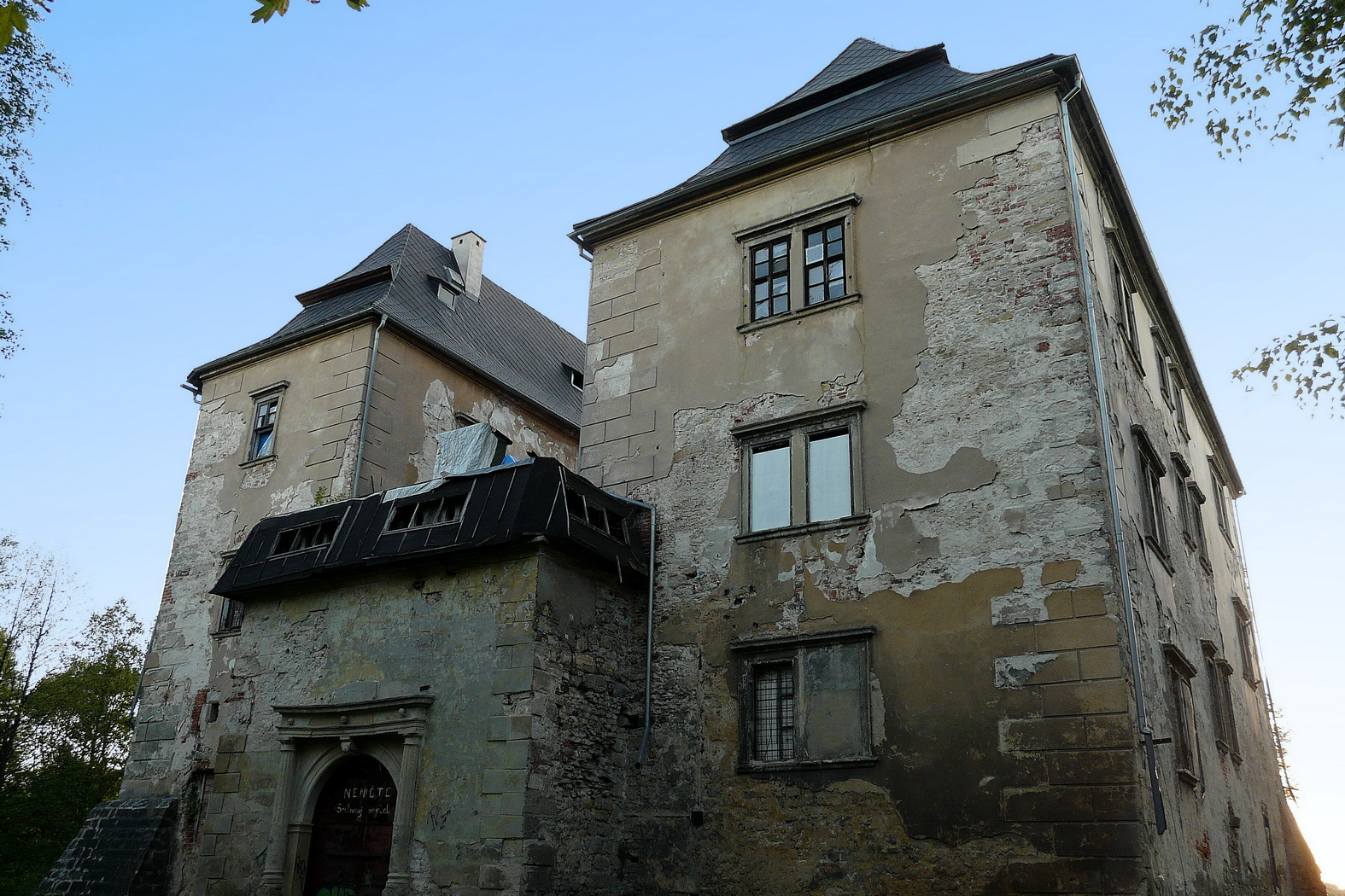 Zámek Kuřívody